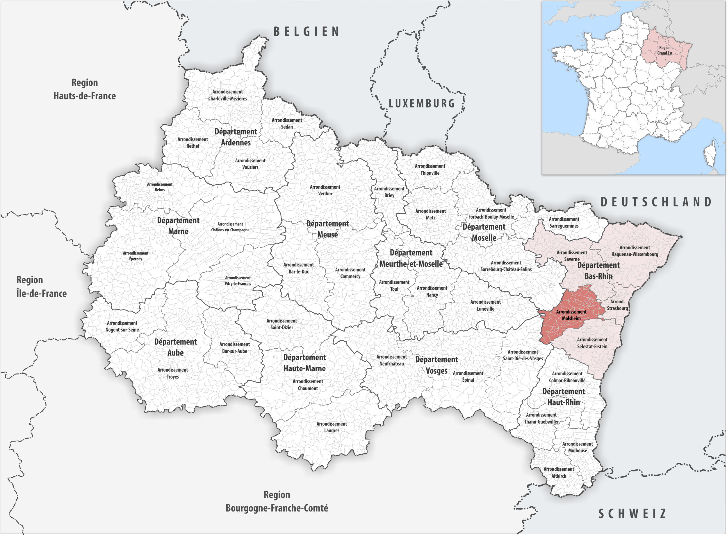 Lage des Arrondissements Molsheim